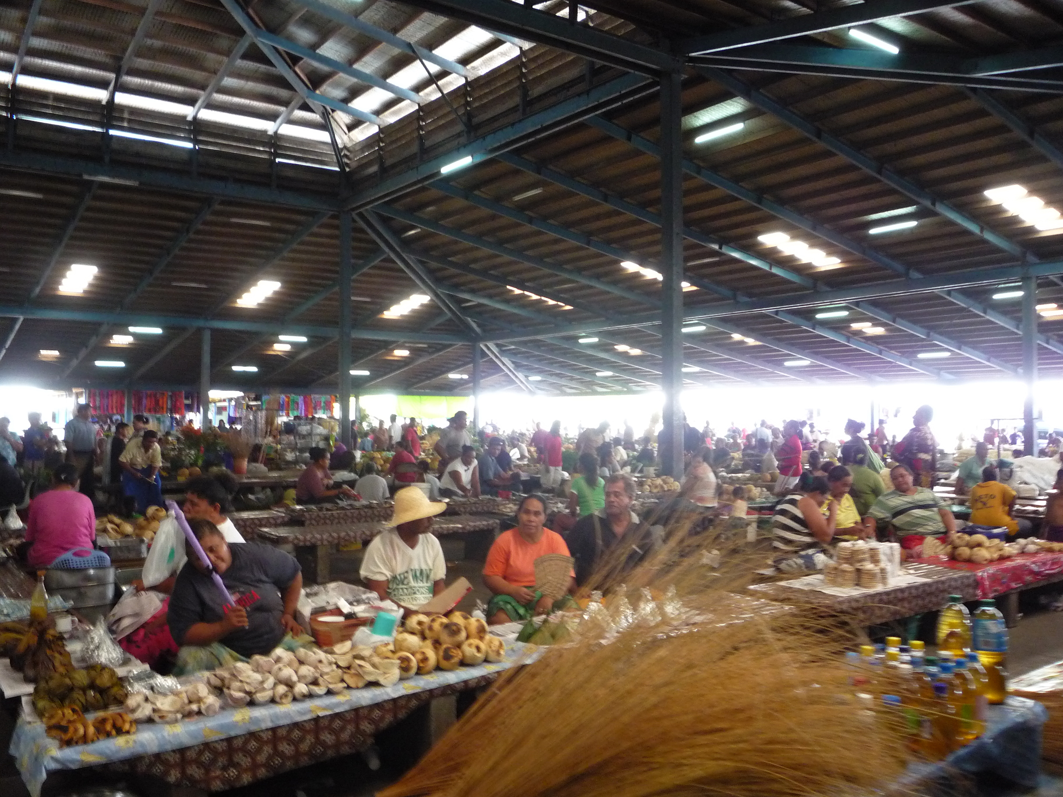 Makeki fou (new market) in Apia, Samoa.